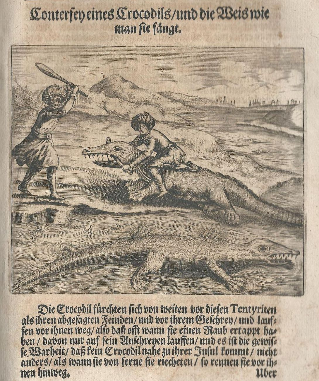 Conterfey eines Crocodils / und die Weis wie man sie fängt in: Christoph Harant Freyherr von Polschiz (1564-1621): Der Christliche Ulysses oder Weit-versuchte Cavallier […]. Nürnberg, 1678; Kupferstich